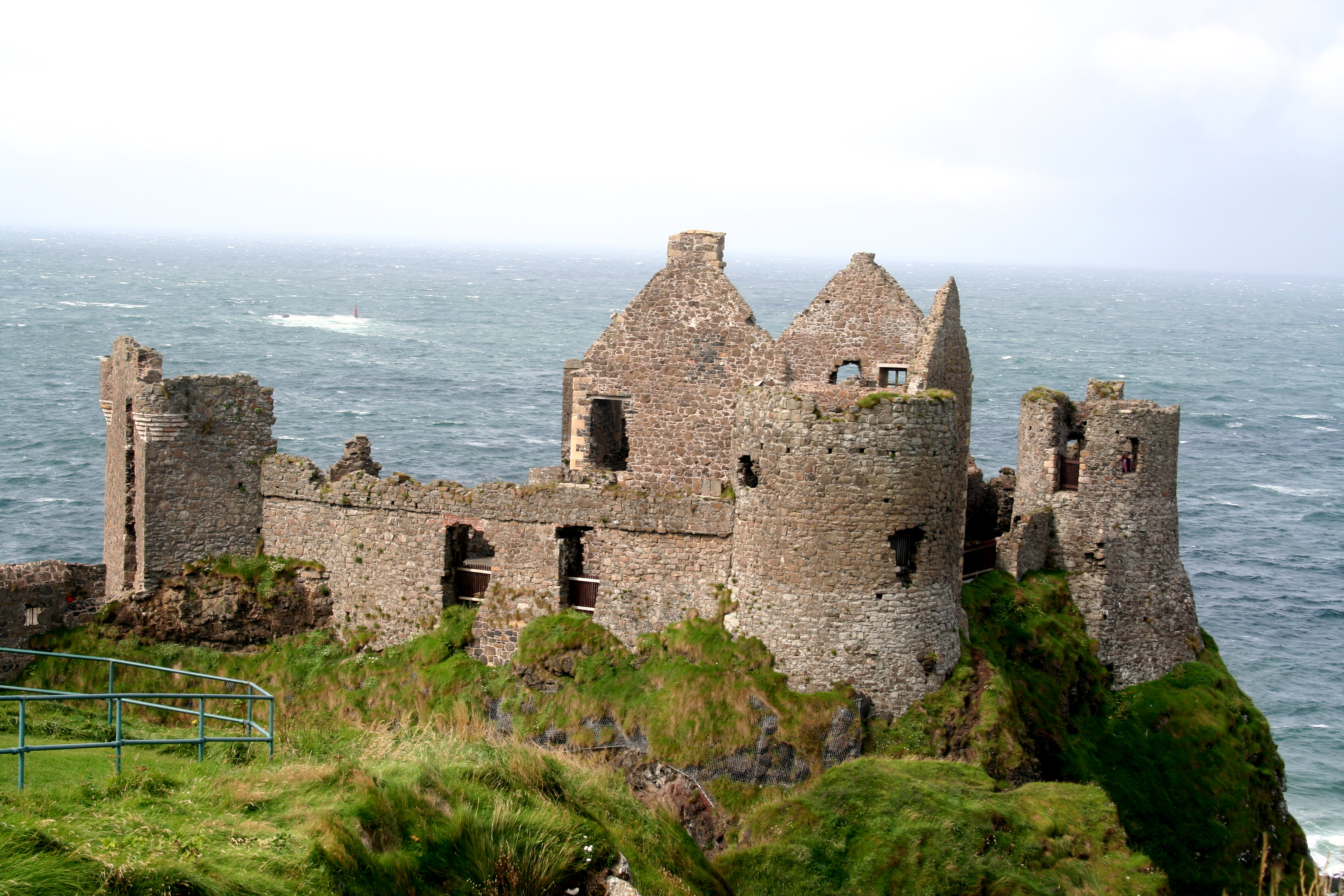 Castillo de Dunluce, condado de Atrim, Irlanda del Norte